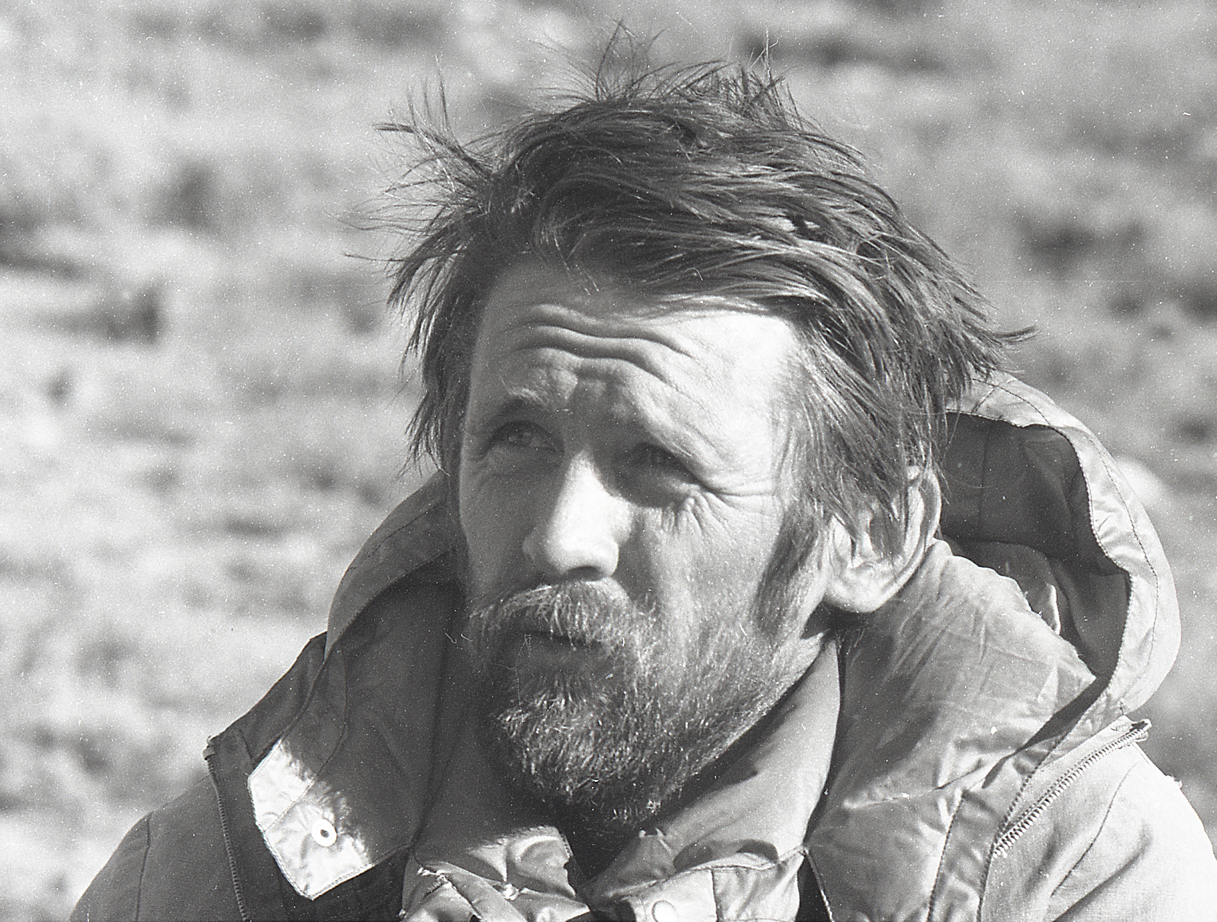 Alfred Lõhmus